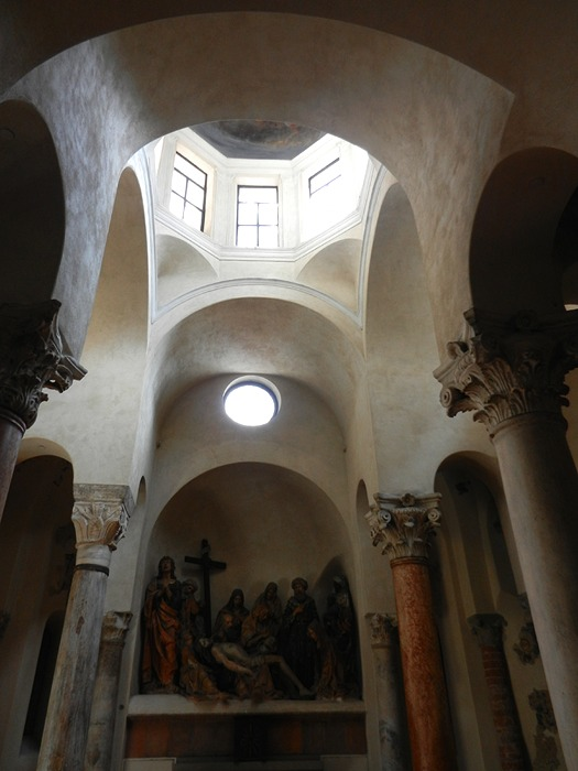 Milano - Sacello di S. Satiro nella Chiesa di S. Maria presso S. Satiro